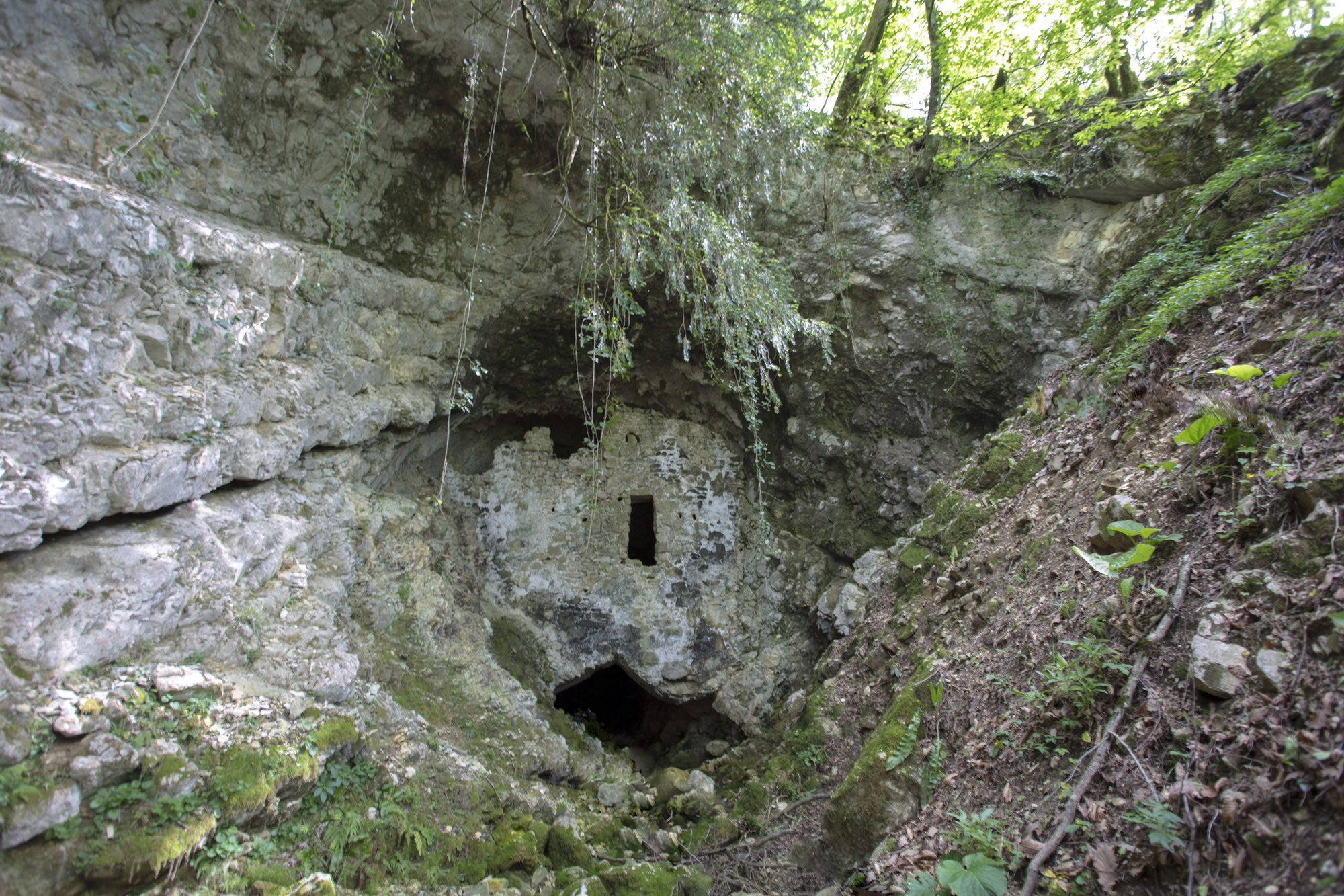 მოთენას მღვიმის ბუნების ძეგლი ღირსშესანიშნაობა: ბუნების ძეგლი წარმოადგენს ასხის მასივზე, ტაბაკელას ქედის ჩრდილო-დასავლეთს ფერდობზე, მდინარე აბაშის ხეობის მარცხენა მხარეს ეოცენური ასაკის შრეებრივ კირქვებში გამომუშავებულ ორსართულიან მღვიმეს, სადაც გაედინება მუდმივმოქმედი ნაკადი, რომელიც მდ. აბაშას უერთება. მისი წინა ნაწილი ჩამონგრეულია და ღია ხეობას წარმოადგენს. აქვე ამოყვანილია ქვითკირის კედელი, დატანილია სათოფურები. მღვიმე ორი დიდი დარბაზისაგან შედგება, რომლებიც ერთმანეთს ვიწრო, მაგრამ მაღალი გასასვლელებით უკავშირდებიან. ბოლო დარბაზის სამხრეთ-აღმოსავლეთ კუთხეში 10 მ საფეხურია, რომლითაც მღვიმის მეორე სართულზე შეიძლება მოხვედრა. აქ მრავლადა: სტალაქტიტები, სტალაგმიტები, ტრავერტის კასკადები, გურები, ფარდები, ასევე დიდი ზომის ლოდები, გამოფიტვის ადგილობრივი მასალა. მღვიმეში ბინადრობენ ობობები და სხვა მწერები. ისტორიული ნაგებობა შუა საუკუნეებში გამოყენებული იყო ციხე-სიმაგრედ. მდებარეობა: მარტვილის მუნიციპალიტეტი, სოფ. პირველი ბალდის მიდამოები, 473 მეტრი ზღვის დონიდან. კოორდინატები: N42 28.595 E42 23.470